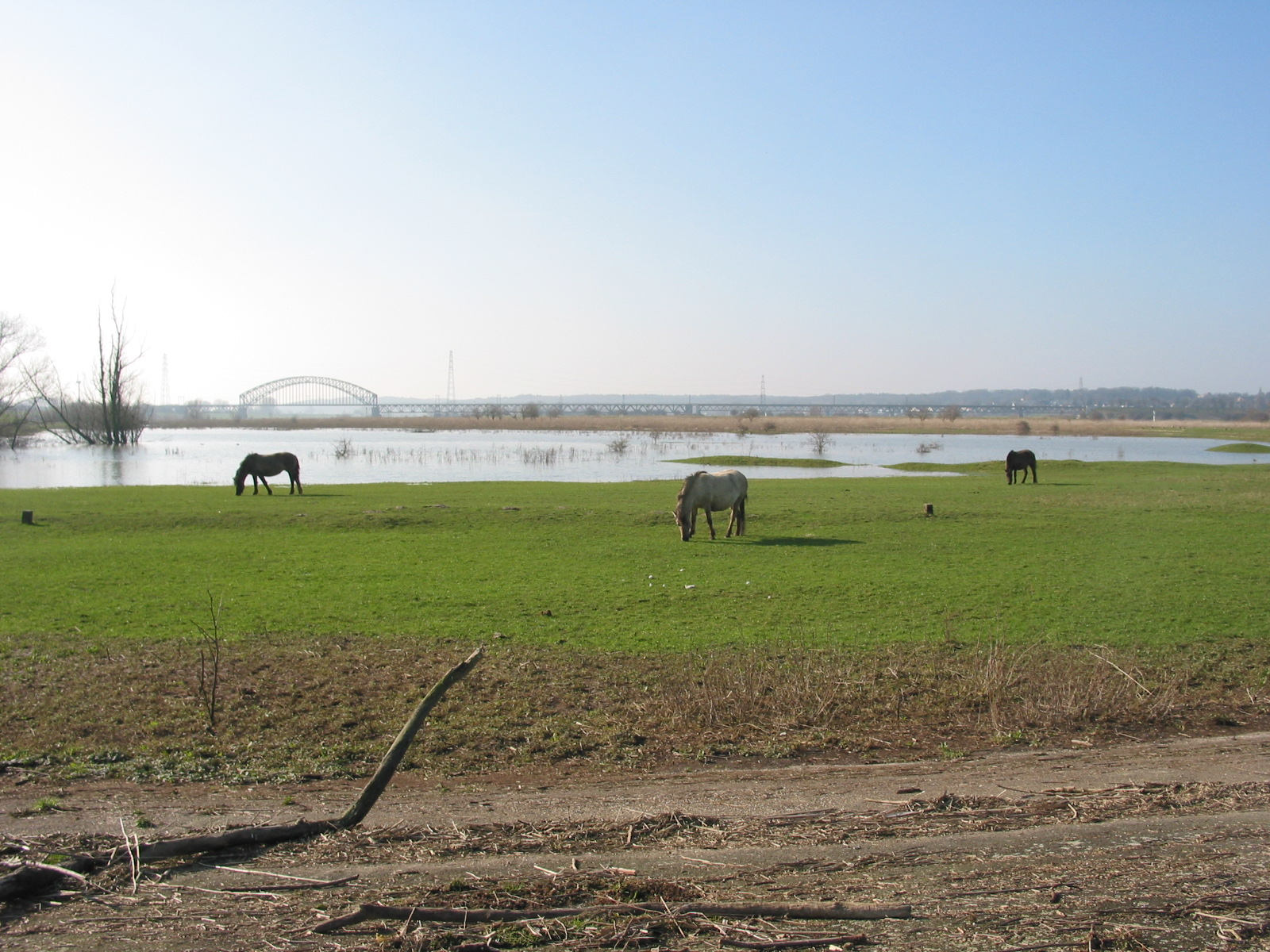 Meinerswijk bij hoge waterstand